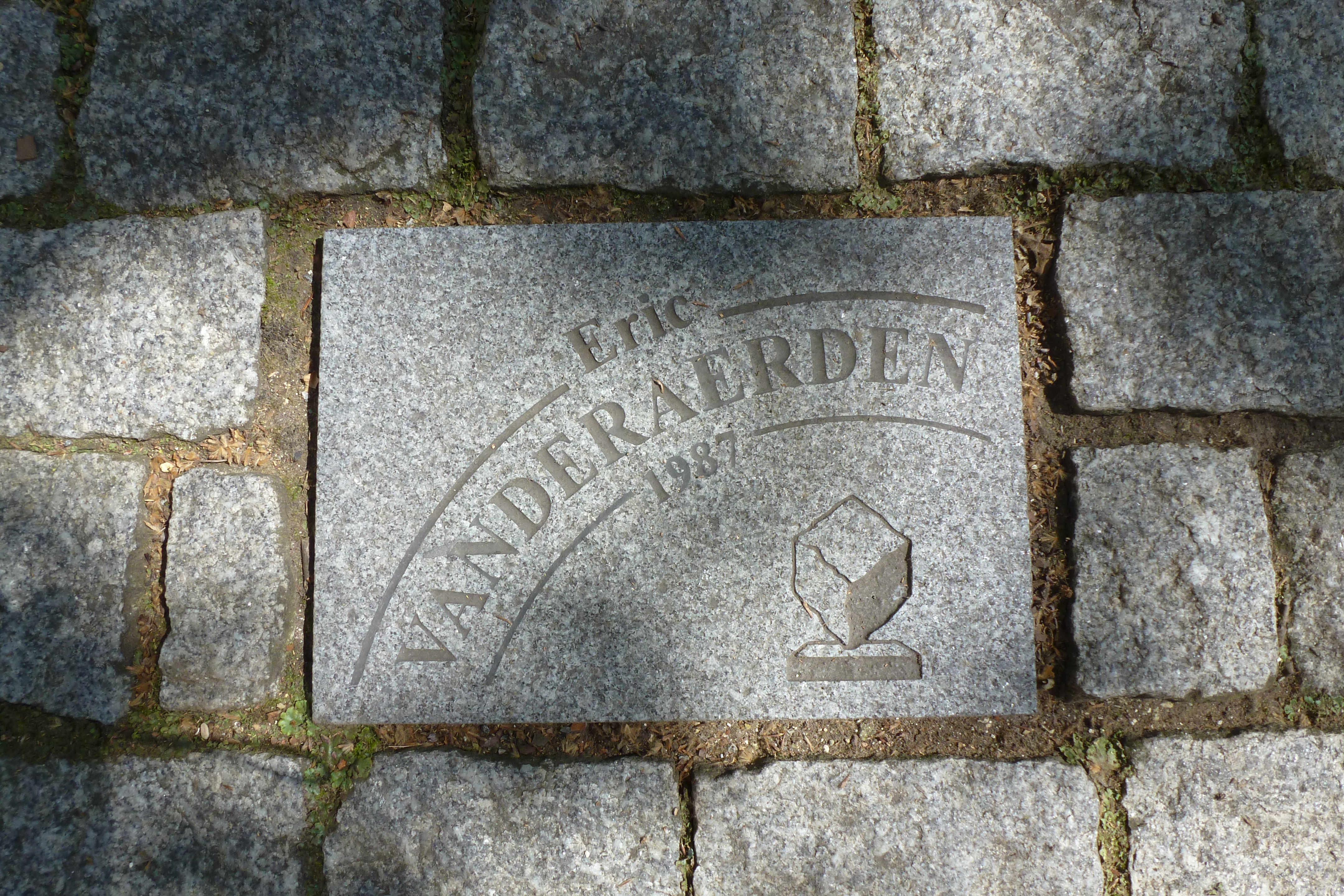 Pflasterstein für Eric Vanderaerden auf der Allée Charles Crupelandt in Roubaix